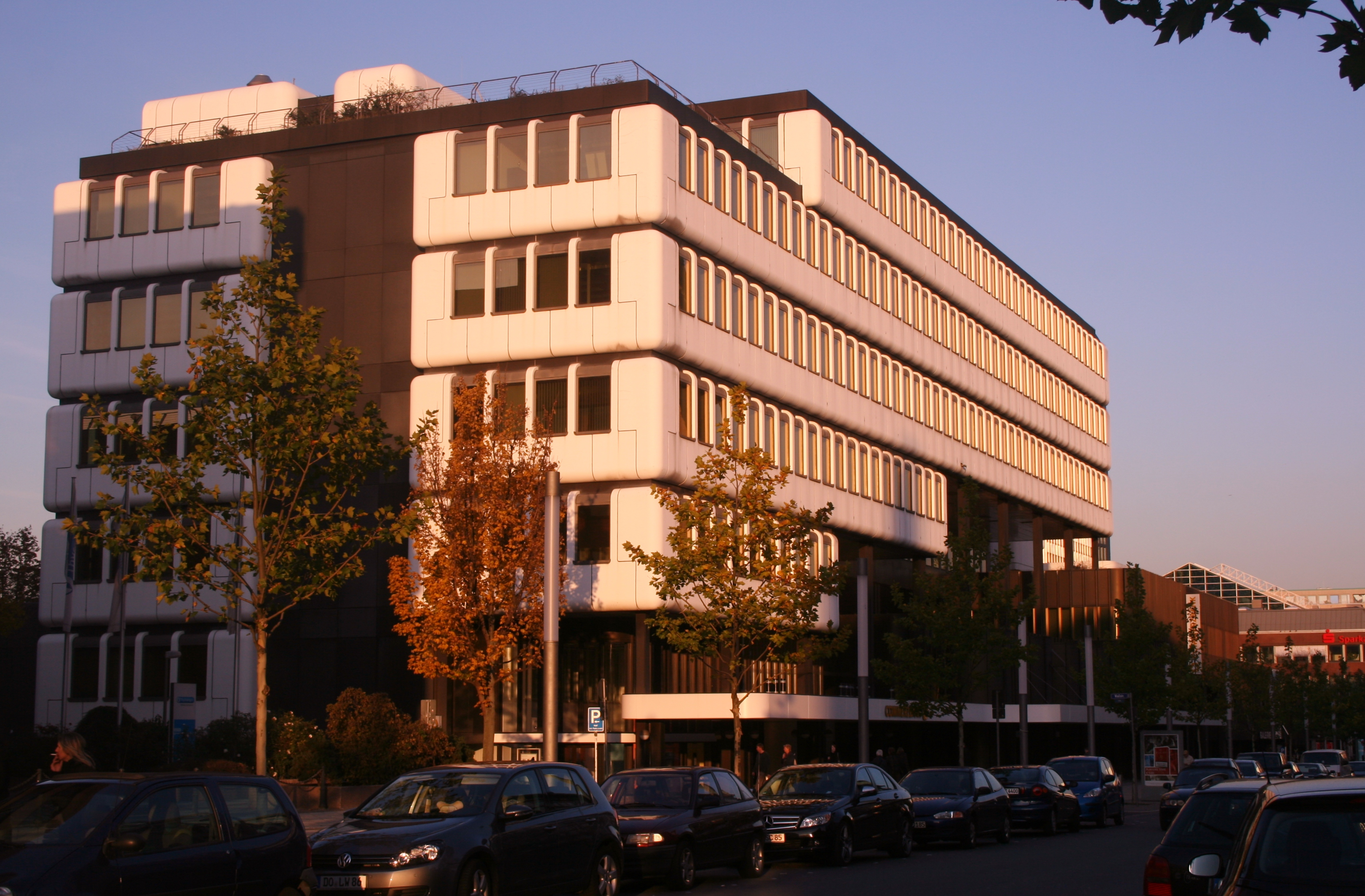 Deilmann-Bau Kampstraße, erbaut 1978